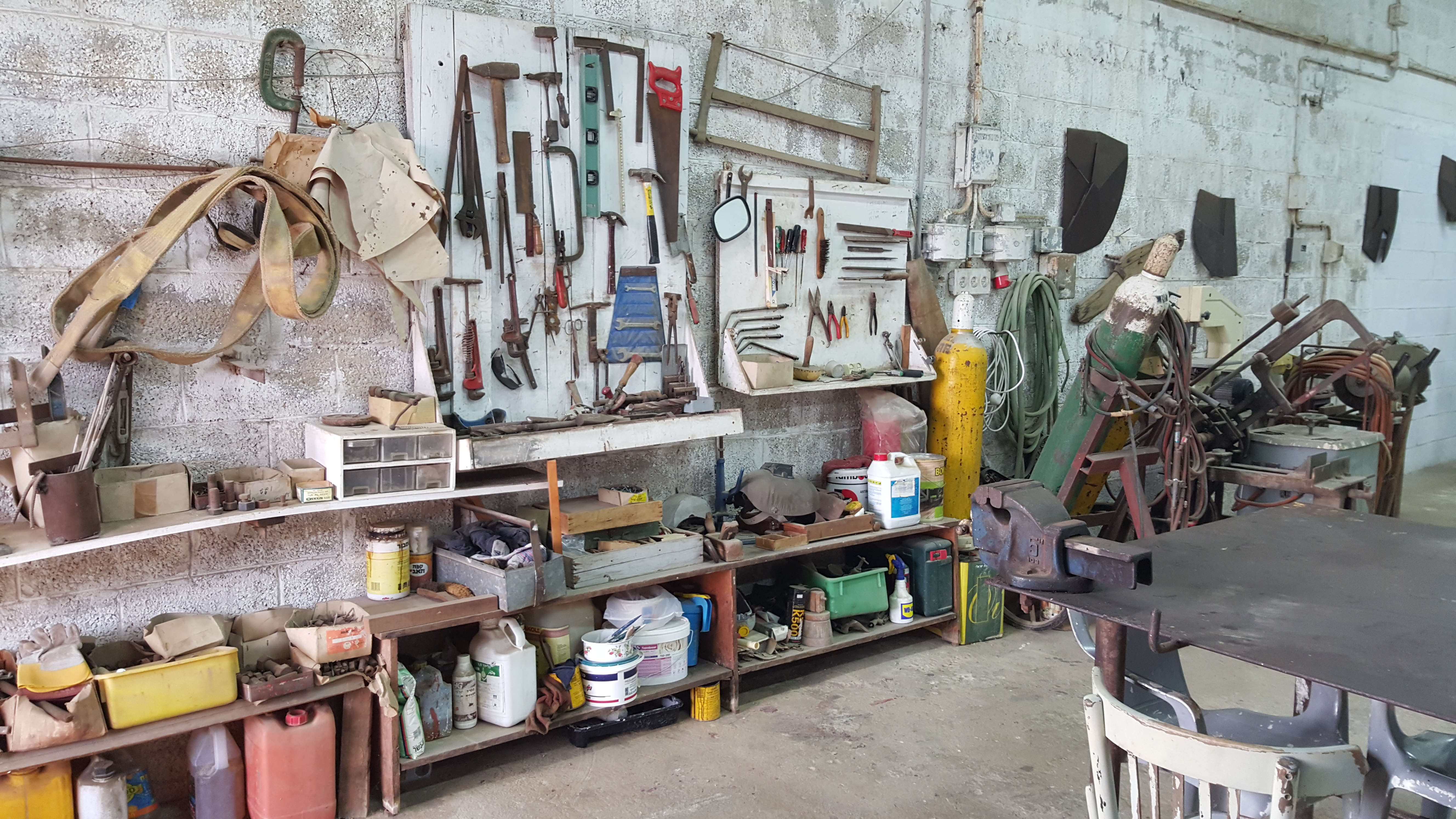 סביבת העבודה של יחיאל שמי